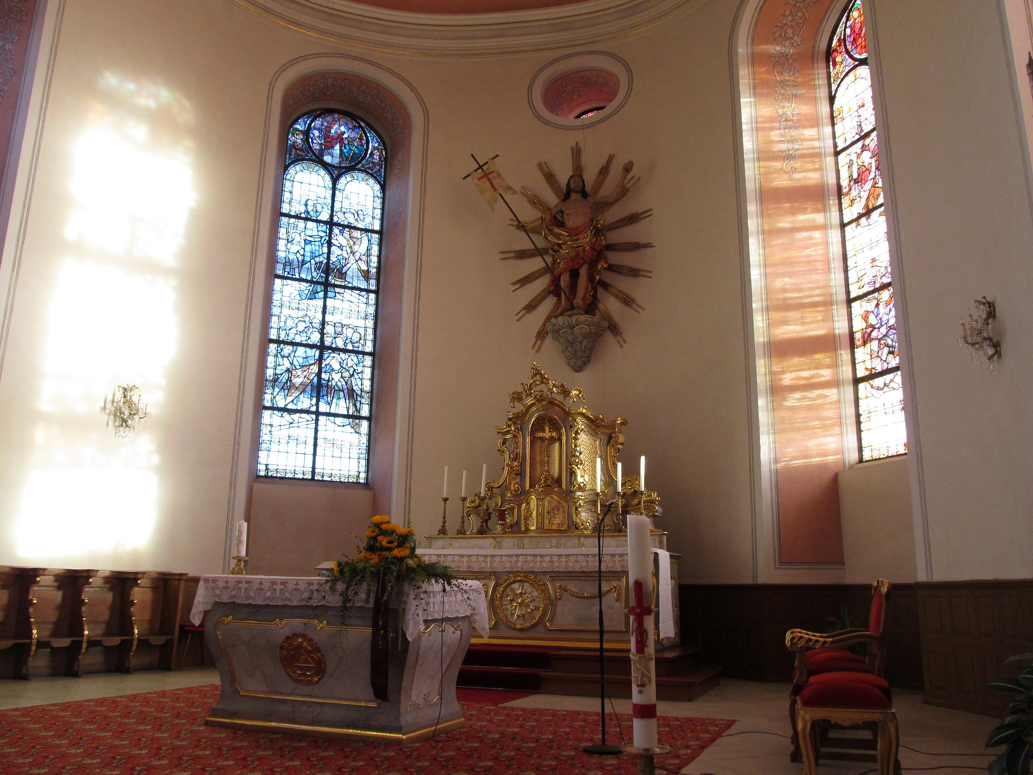 Altarraum der katholischen Pfarrkirche St. Stephan in Illingen, Saarland